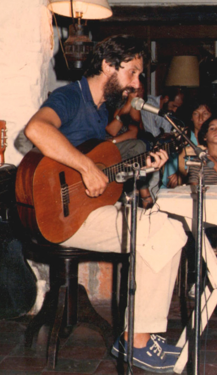 Fotografía del músic uruguayo Jorge Lazaroff.